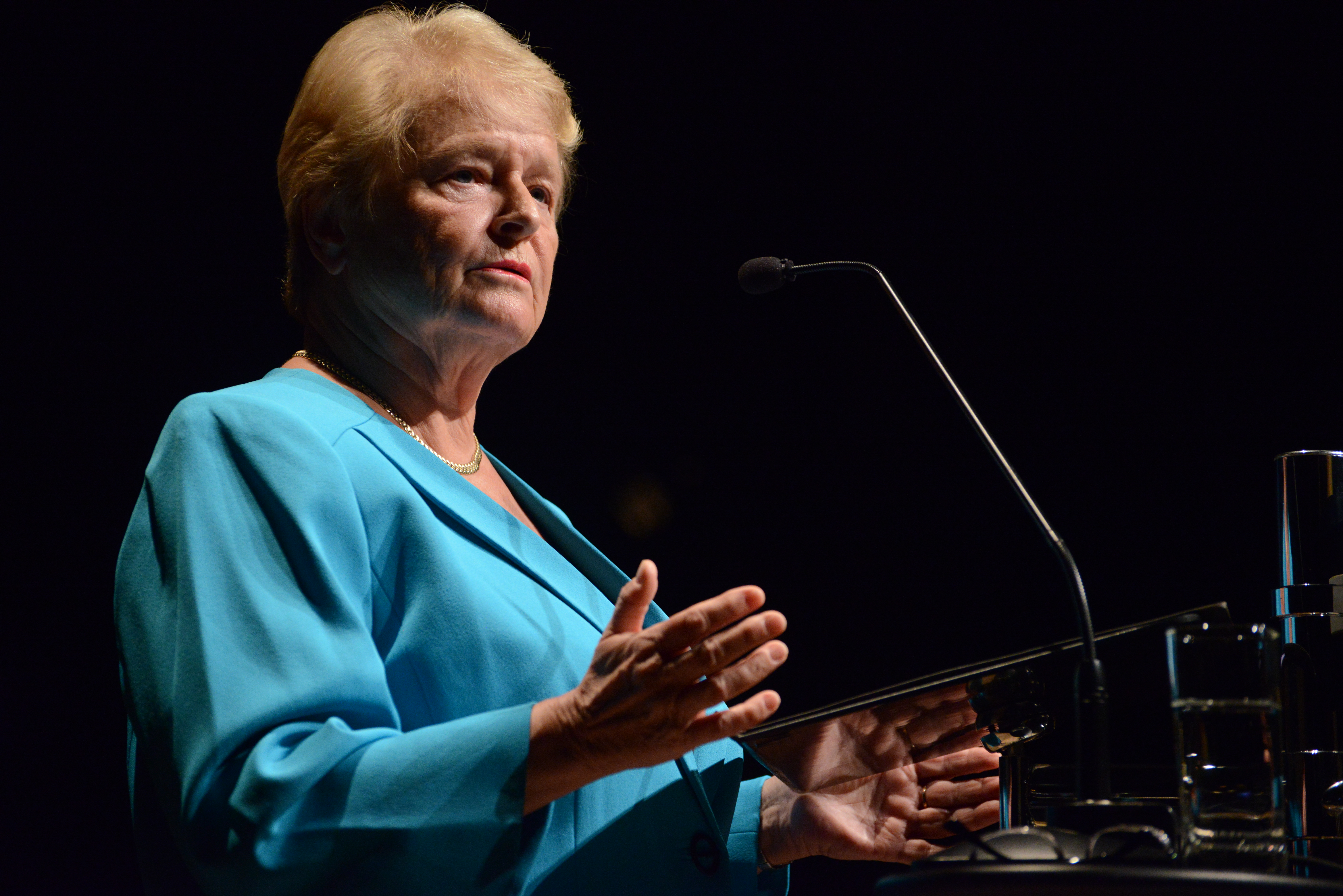 Conferencista: Gro Brundtland, diplomata norueguesa Data: 29 de setembro de 2014 Local: Salão de Atos da UFRGS - Porto Alegre/RS Crédito: Luiz Munhoz